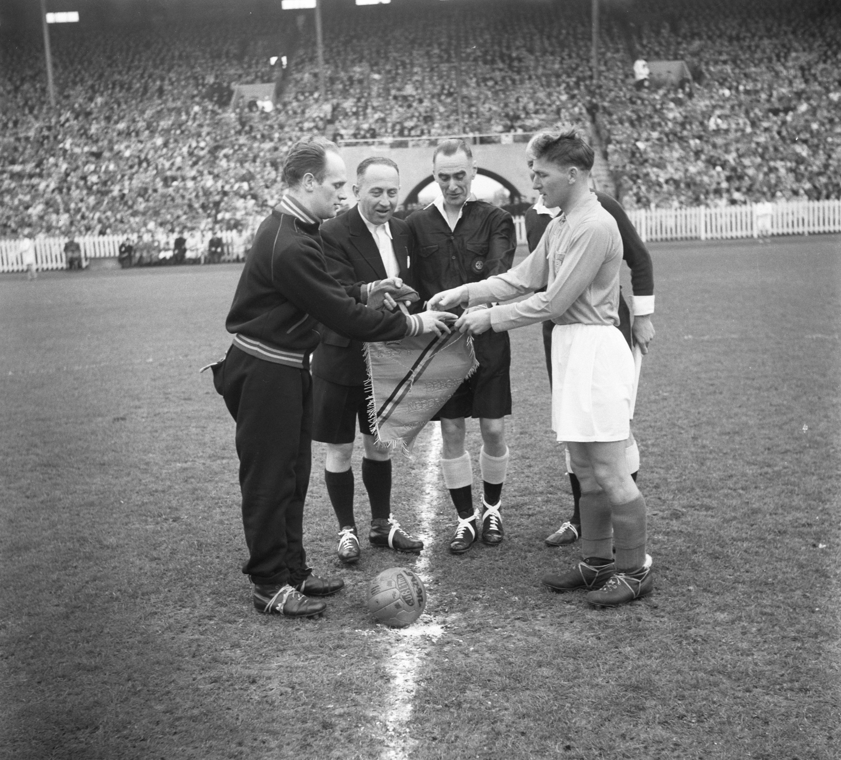 Collectie / Archief : Fotocollectie Anefo Reportage / Serie : [ onbekend ] Beschrijving : Voetbalwedstrijd Belgie tegen Holland in Deurne (4-2) Aanvoerders wisselen vaantjes uit Annotatie : Links Herni Meert. Rechts Louis Biesbroeck. In het midden scheidsrechter. John W. Topliss Datum : 6 april 1952 Locatie : Deurne (België) Trefwoorden : voetbal, voetballers Fotograaf : Pot, Harry / Anefo Auteursrechthebbende : Nationaal Archief Materiaalsoort : Negatief (zwart/wit) Nummer archiefinventaris : bekijk toegang 2.24.01.03 Bestanddeelnummer : 905-0426